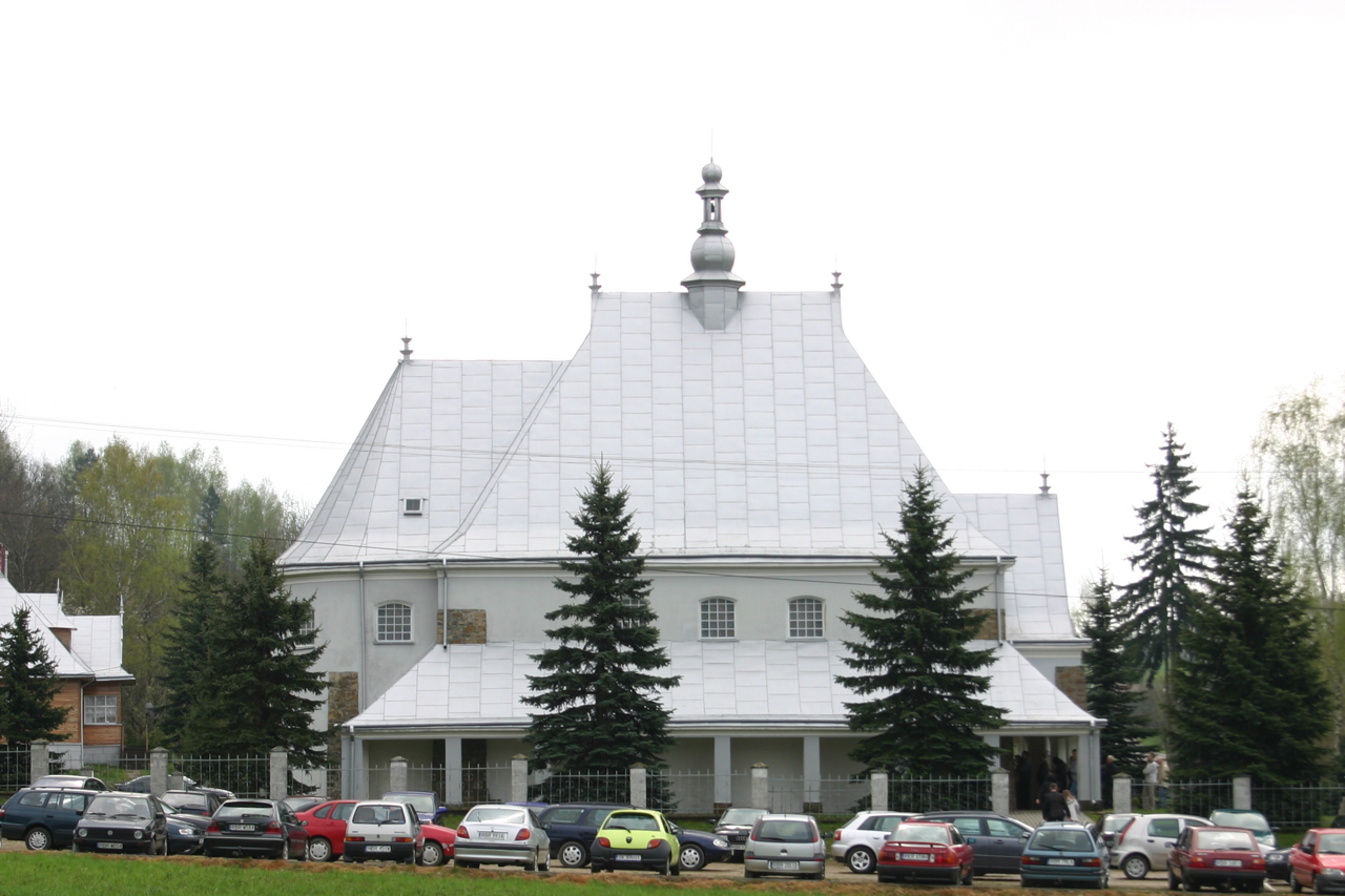 Malinówka (województwo podkarpackie) Object location49° 41′ 47″ N, 21° 55′ 35″ E